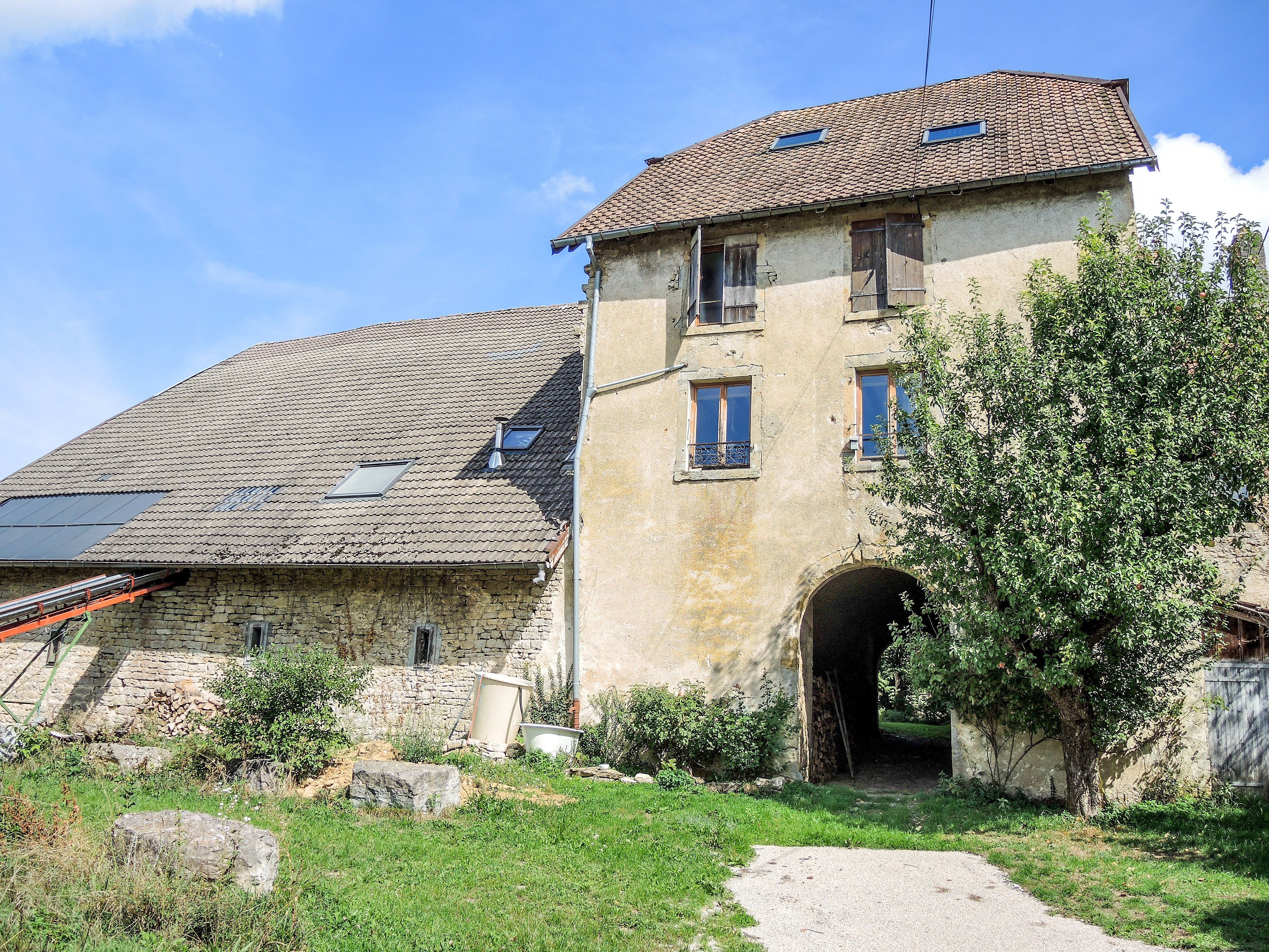 Porche d'entrée et façade ouest de l'ancien prieuré de Lanthenans. Doubs